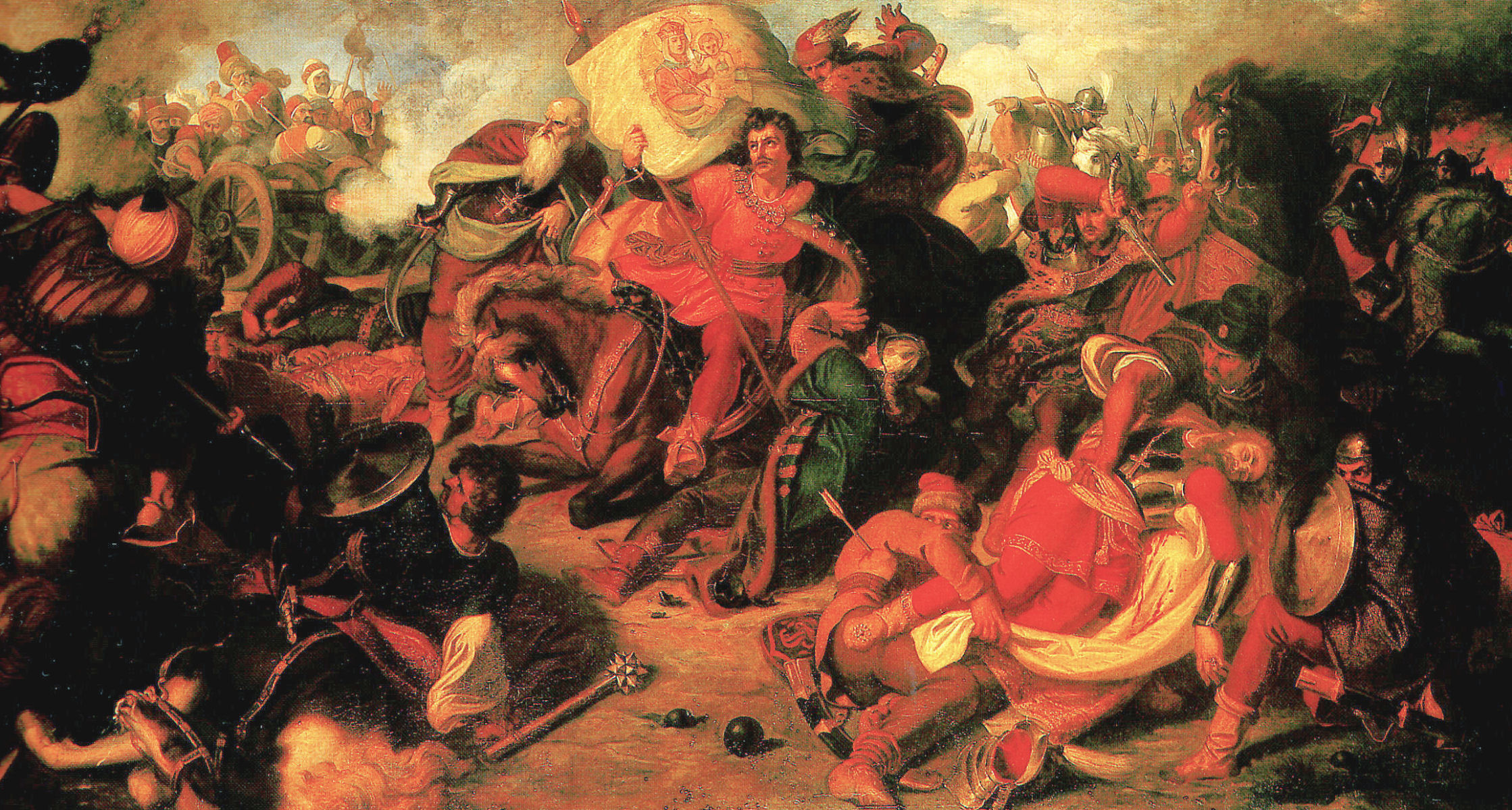 Than Mór: A mohácsi csata